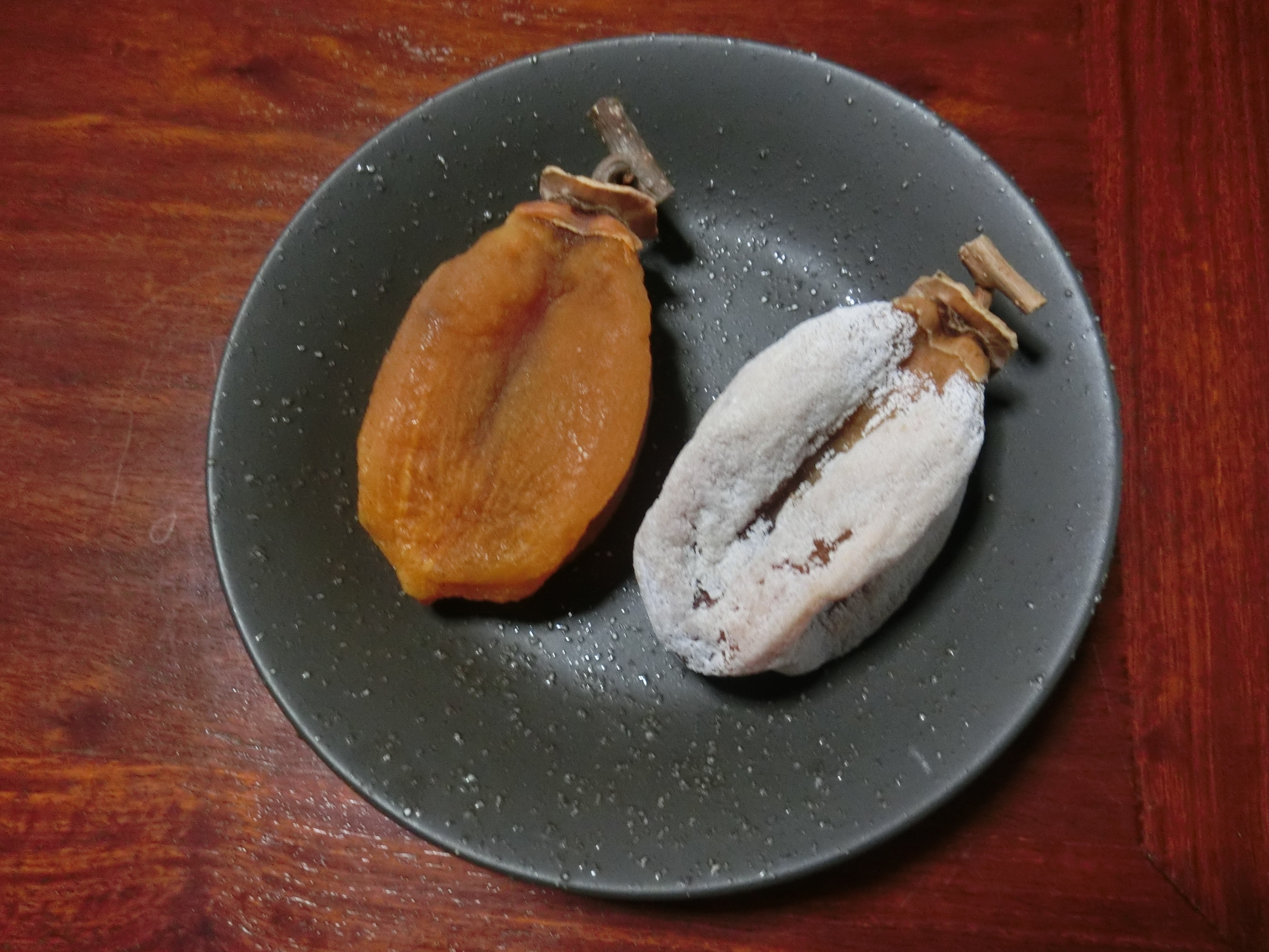 岐阜県の伝統食品 堂上蜂屋柿